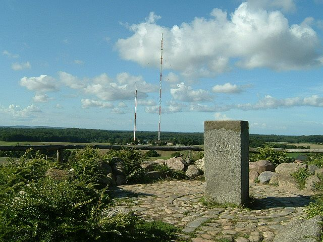 169 m high Bungsberg, summit stone